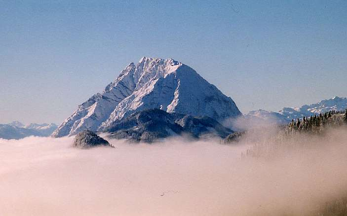 Grimming von der Hintereggeralm aus gesehen